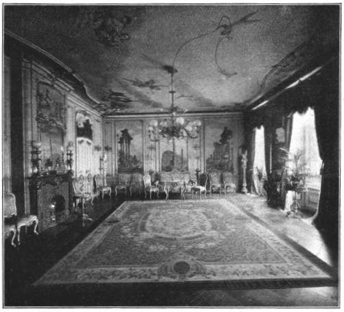 Saal im Ermelerhaus, Berlin, Breite Straße 11, um 1912